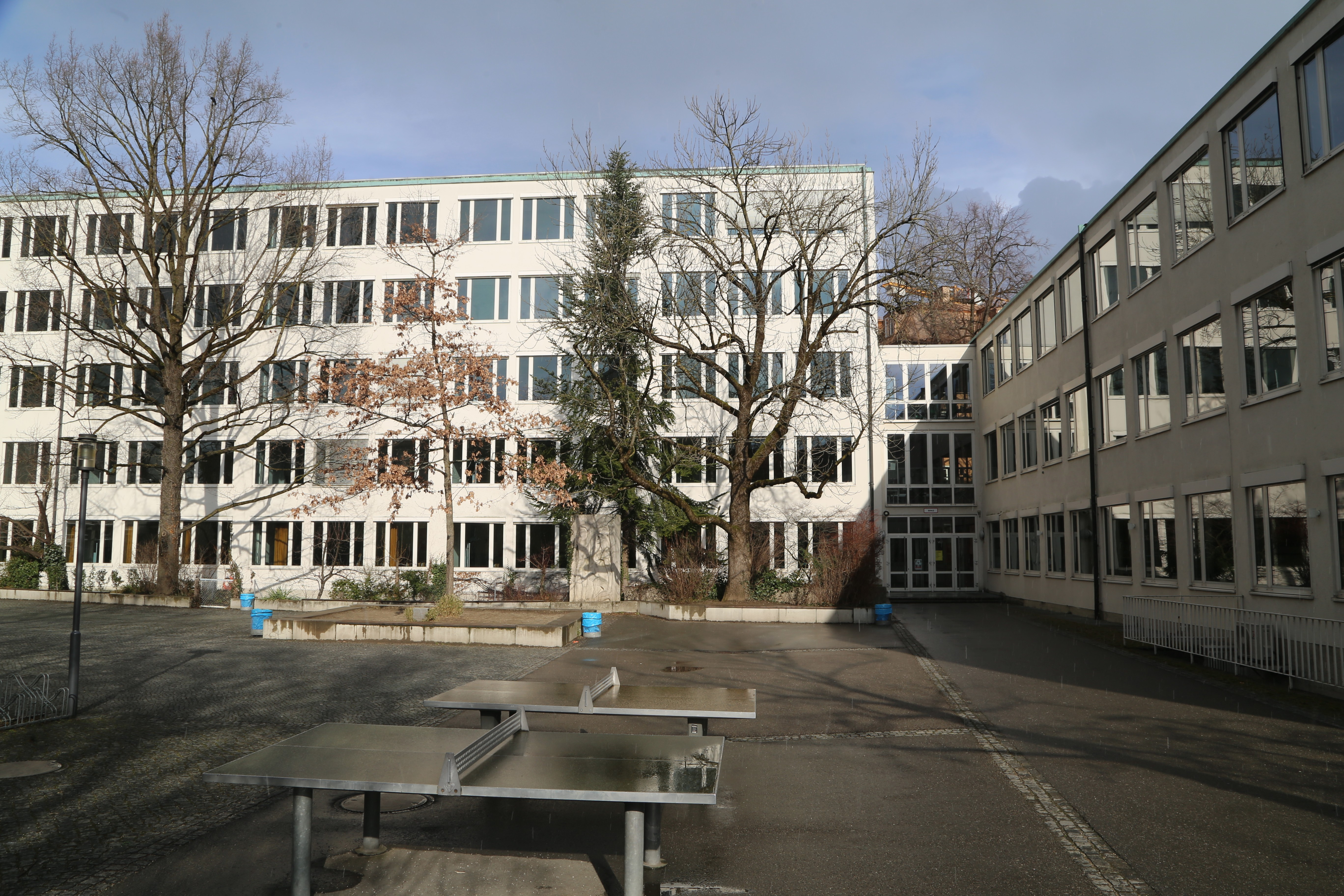 Staatliches Luitpold-Gymnasium München, Seeaustraße 1